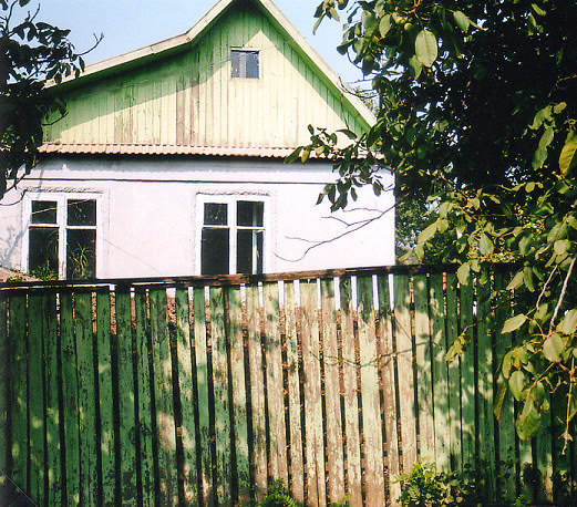 Hannowka, früheres deutsches Wohnhaus